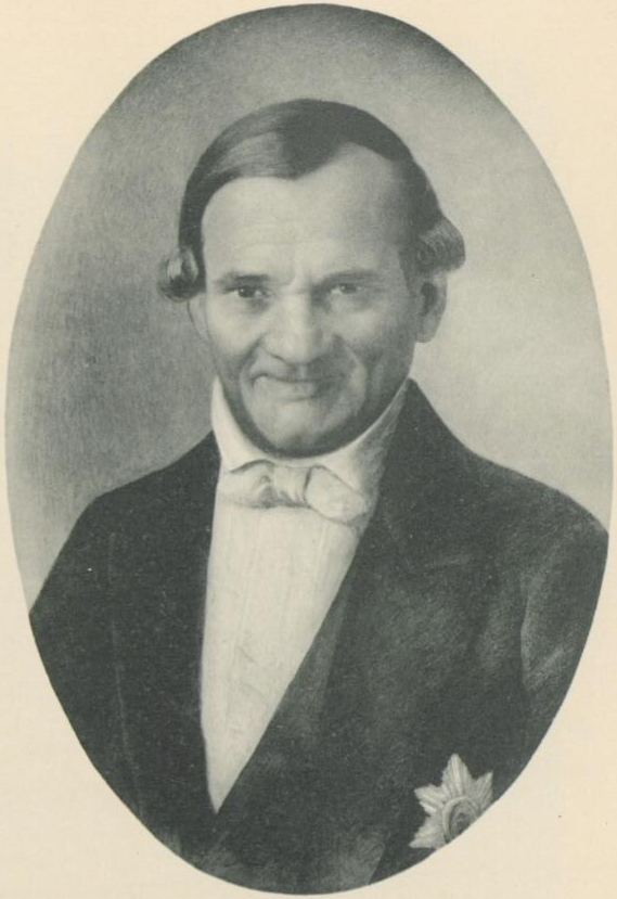 Глинка, Фёдор Николаевич. В отставке, в Твери, 1878 г.